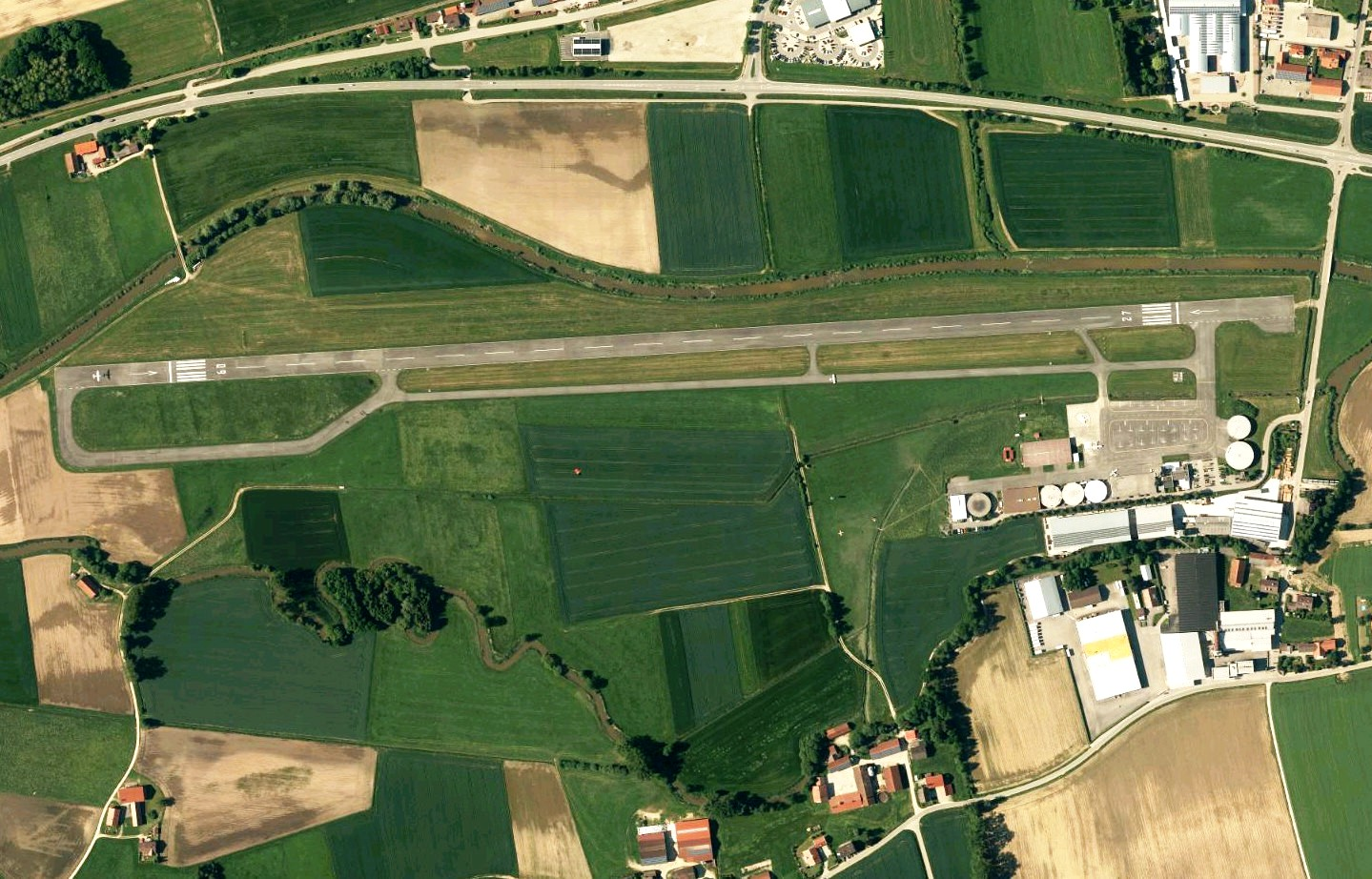 Luftaufnahme der Bayerischen Vermessungsverwaltung: Flugplatz Eggenfelden im Landkreis Rottal-Inn, Bayern.